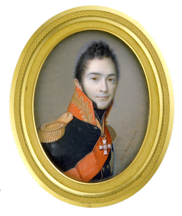 Портрет графа Н.М.Каменского Начало 1810-х Кость, акварель, гуашь. 9,6×7,6 (овал) Справа внизу: Ив: Григорьевъ Граф изображен в общегенеральском мундире с орденами Св. Александра Невского и Св. Георгия 2-й степени. Происхождение: собрание великого князя Николая Михайловича (1859–1919); собрание Галины Вишневской и Мстислава Ростроповича. Выставки: Историческая выставка предметов искусства, С.-Петербург. 1904 г. Санкт-Петербург, 1904, с. 8, № 68. Литература: Русские портреты XVIII и XIX столетий. Издание Великого князя Николая Михайловича. СПб., 1905, т. 1, илл. 79; Комелова Г.Н., Принцева Г.А. Неизвестный миниатюрист первой трети XIX в. Иван Григорьев // Памятники культуры: новые открытия, 1987. М., 1988, с. 262–263.